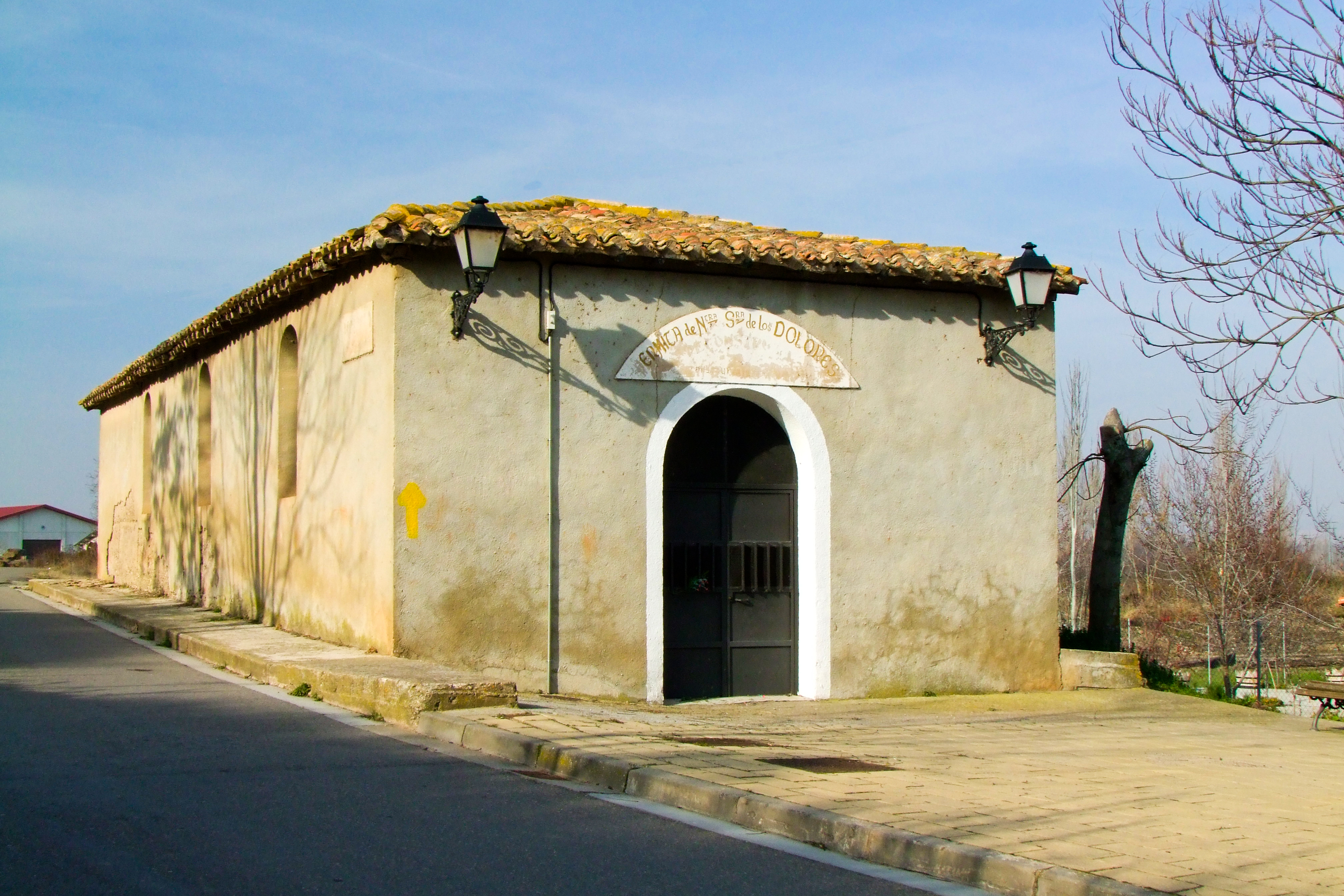 Ermita de Nuestra Señora de los Dolores en la localidad de Agoncillo, La Rioja - España